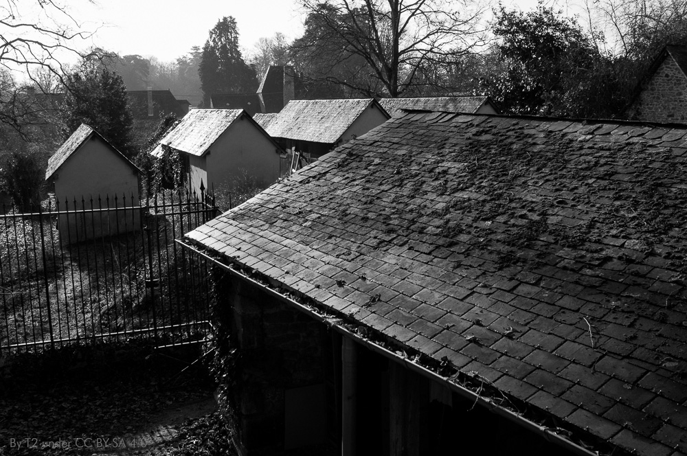 Cour de l'ancienne école maternelle, et cabanons au delà des grilles. Les cabanons, à proximité des jardins ouvriers, sont une composante représentative, presque symbolique, du village industriel de Fontaine-Daniel.